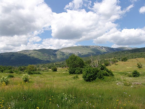 Планина Голија